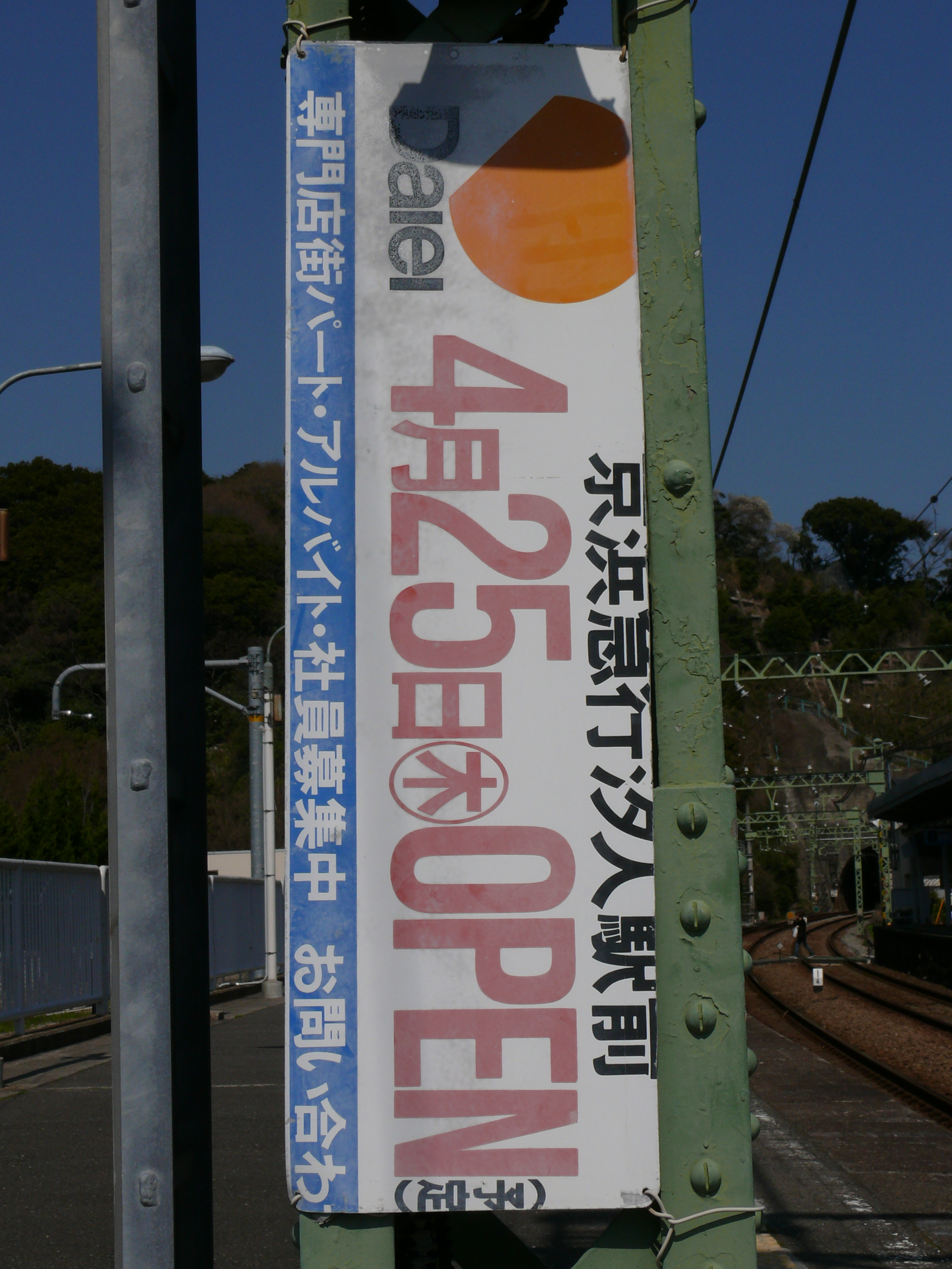 ショッパーズプラザ横須賀開業広告（京浜急行逗子線 神武寺駅ホーム） 現在は撤去されている。